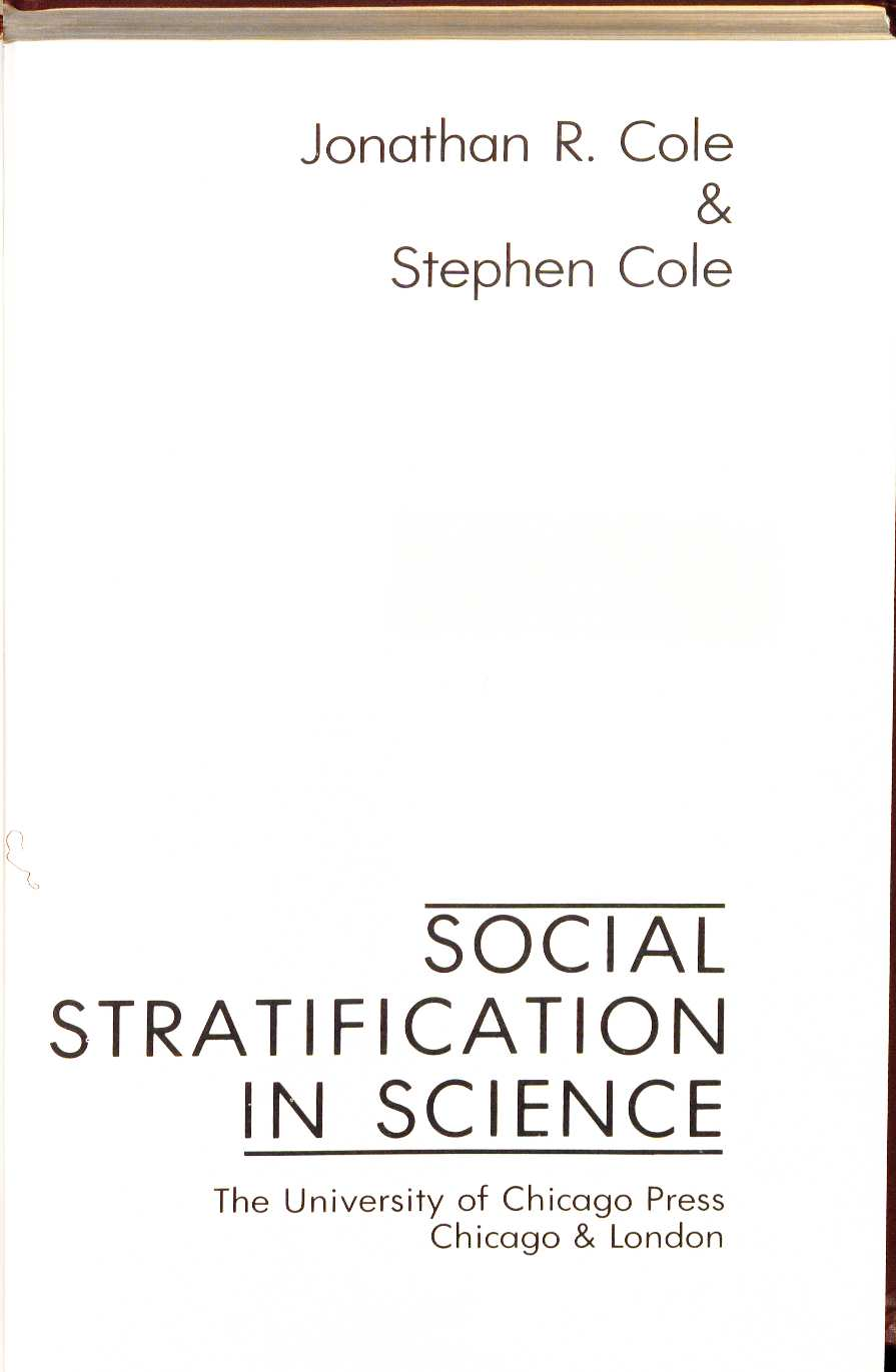 Jonathan R. Cole Stephen Cole Social Stratification in Science 1973 Titel